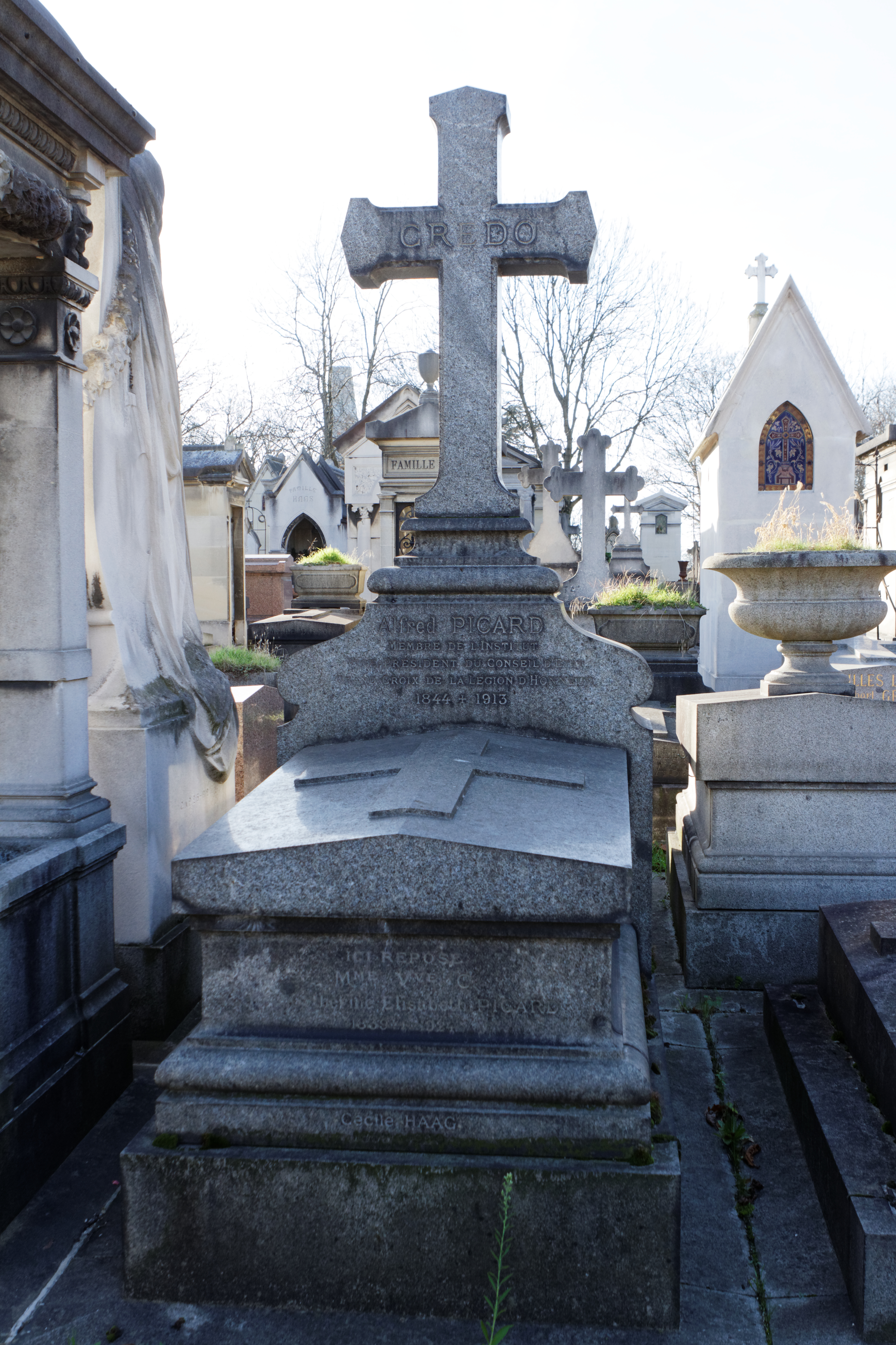 Sépulture d'Alfred Picard (1844-1913), ingénieur, administrateur et vice-président du Conseil d'État.